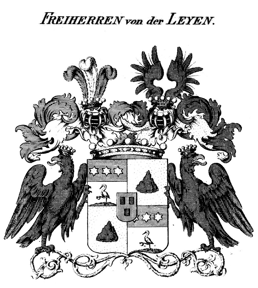 Wappen der Freiherren von der Leyen aus Krefeld